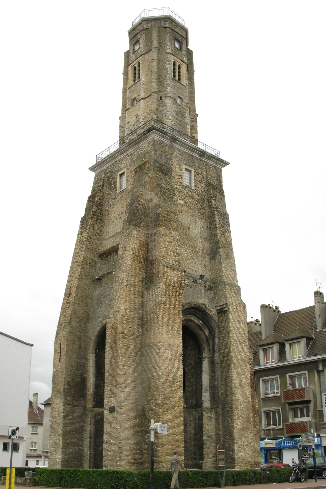 Tour du Guet zu Calais am August 2008. Kategorie:Tierm a Frankräich